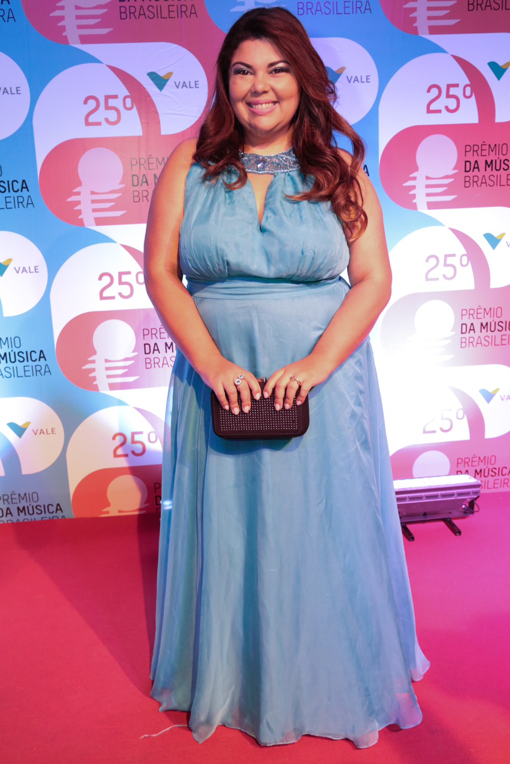 Fabiana Karla durante o 25º Prêmio da Música Brasileira no Theatro Municipal.